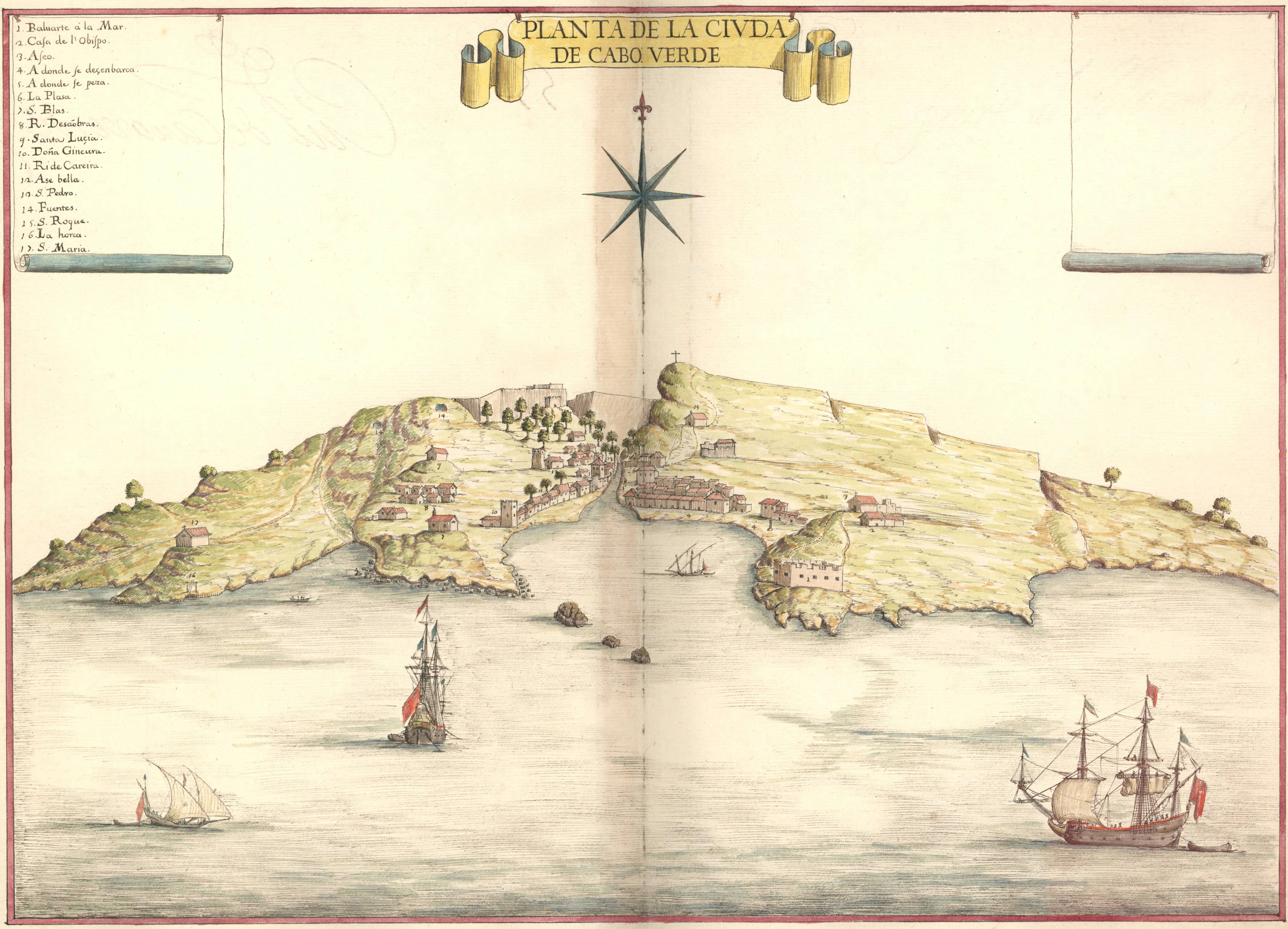 Planta de la Ciudade Cabo Verde Antiga Ribeira Grande, Cidade Velha, ilha de Santiago, Cabo Verde. Vista aguarelada. Atlas de Leonardo de Ferrari, 1655. Arquivo Militar de Estocolmo, Krigsarkivet, (Handritade Kartverk, cota 51-36 1655), Suécia. Publicada por Rocío Sánchez Rubio, Isabel Testón Núñez e Carlos M. Sánchez Rúbio em Imagens de un Imperio perdido. El Atlas del marques de Heliche. Plantas de diferentes Plazas de España, Italia, Flandres y Las Indias, La memoria ausente. Cartografia de España y Portugal en el Archivo Militar de Estocolmo. Siglos XVII y XVIII, Badajoz, 4 Gatos, 2006, Espanha.